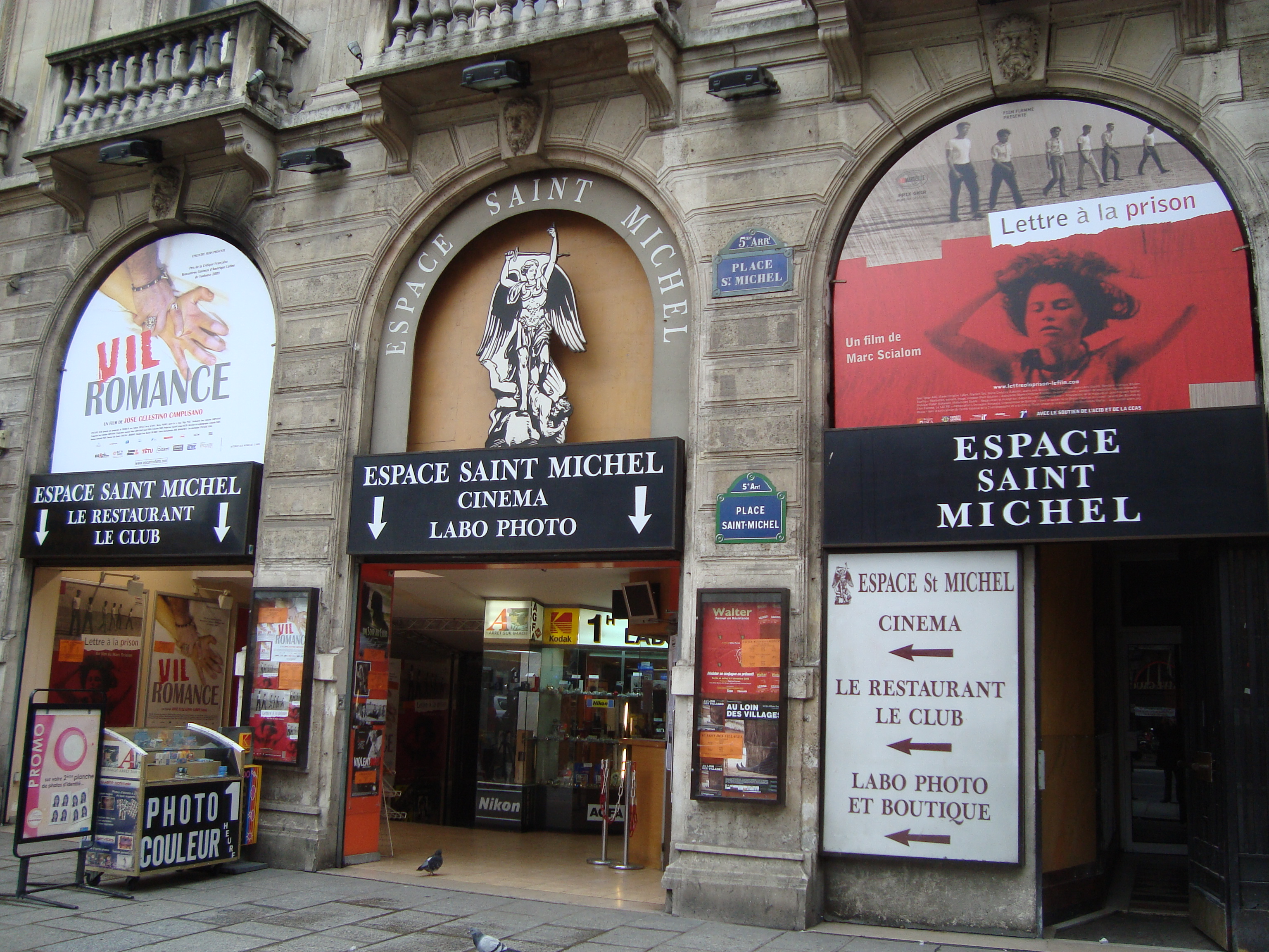 Cinéma Espace Saint-Michel à Paris